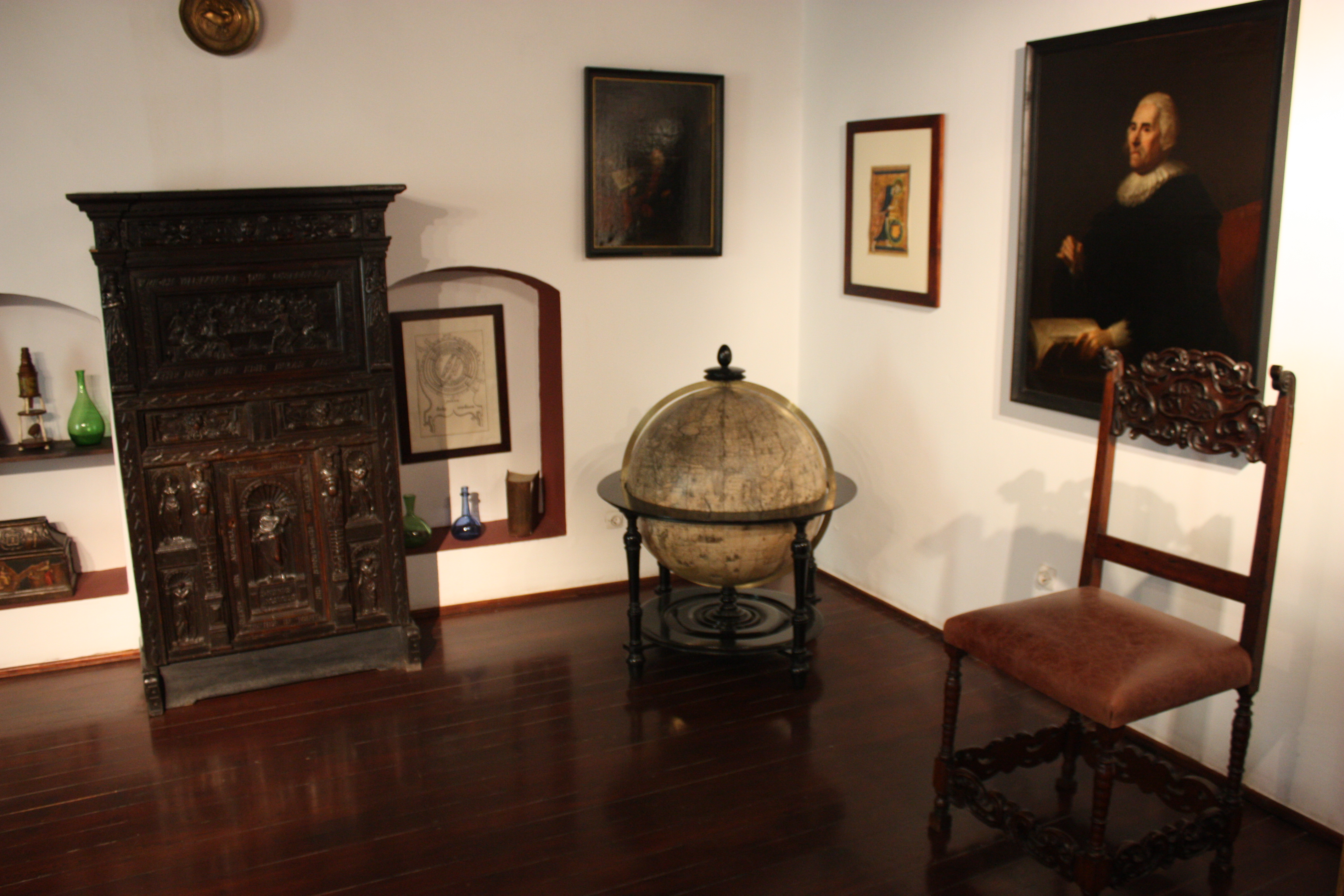 Toruń, kamienica "Dom Kopernika", ok. 1464-80, XIX